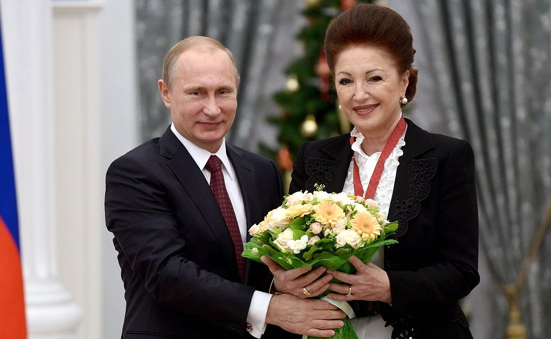 Церемония вручения государственных наград Российской Федерации. Награждение АДАМЯН Лейлы Вагоевны ОРДЕНОМ «ЗА ЗАСЛУГИ ПЕРЕД ОТЕЧЕСТВОМ» III СТЕПЕНИ. 22 декабря 2014 года